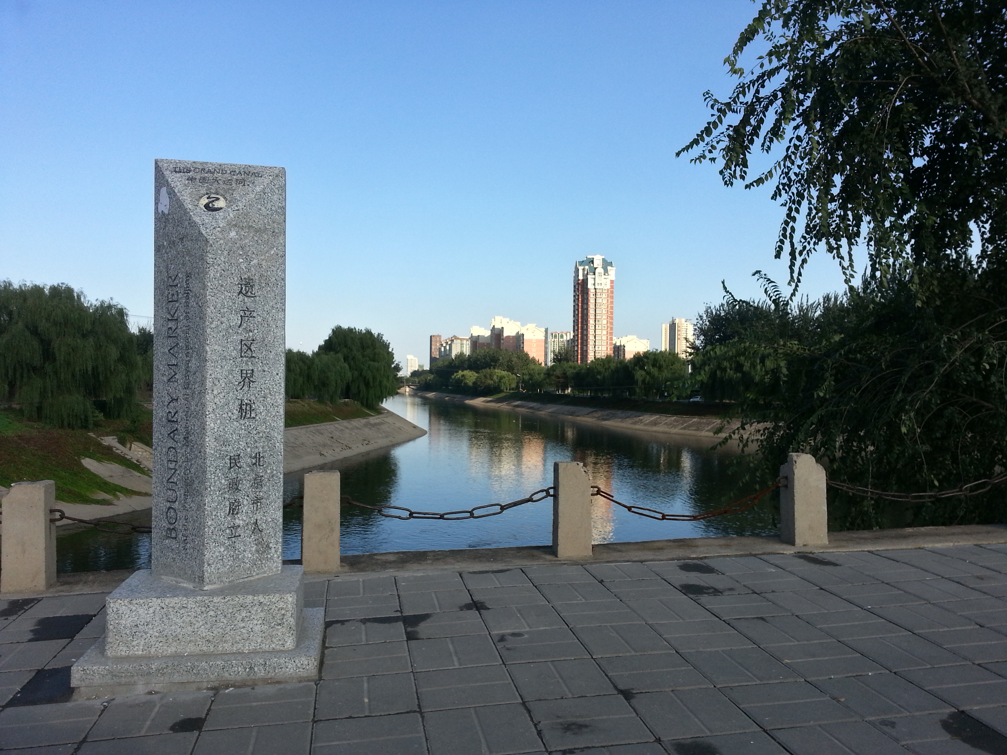 通惠河八里桥大运河遗产碑（南岸）